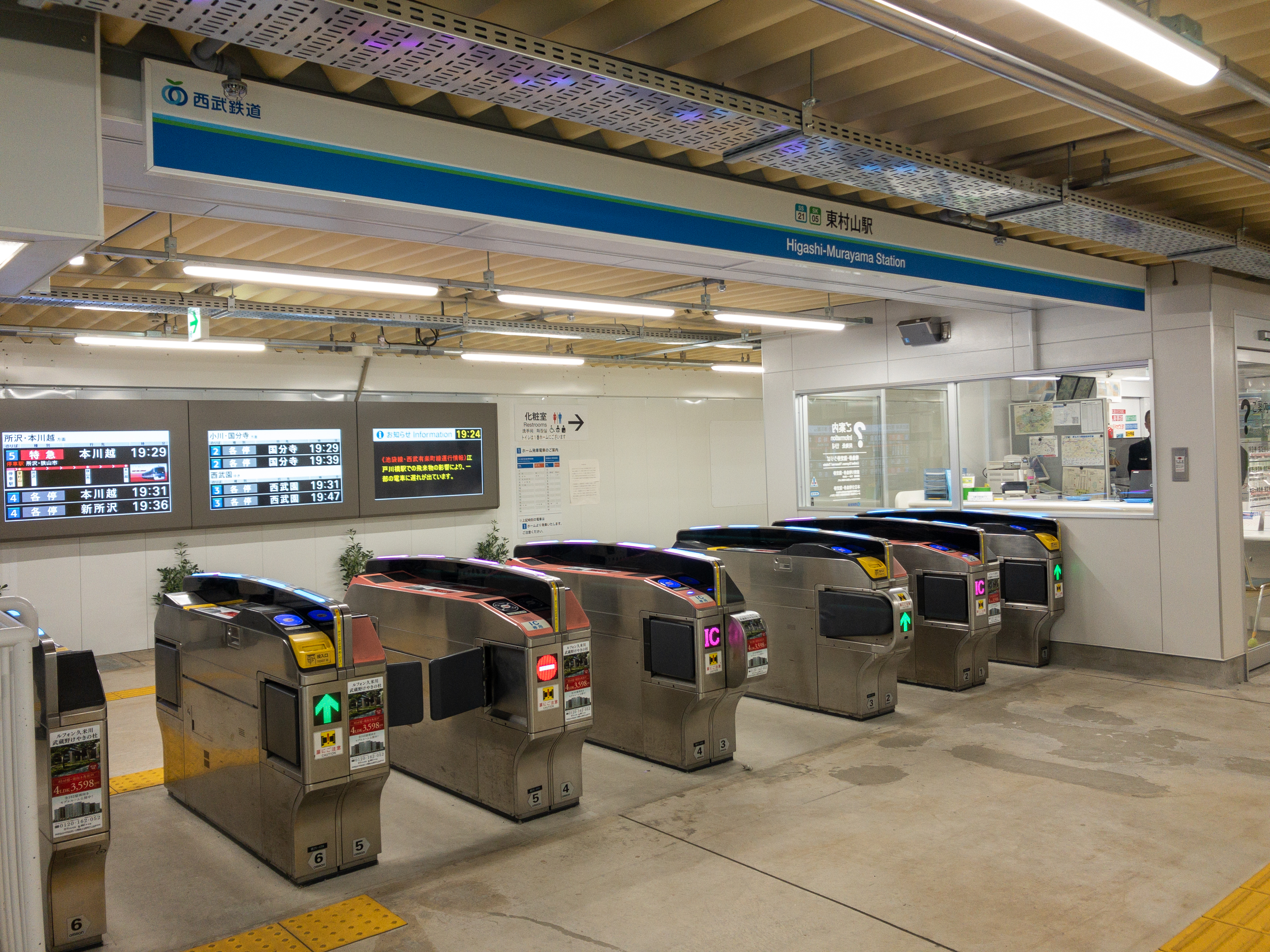 西武鉄道東村山駅地下改札